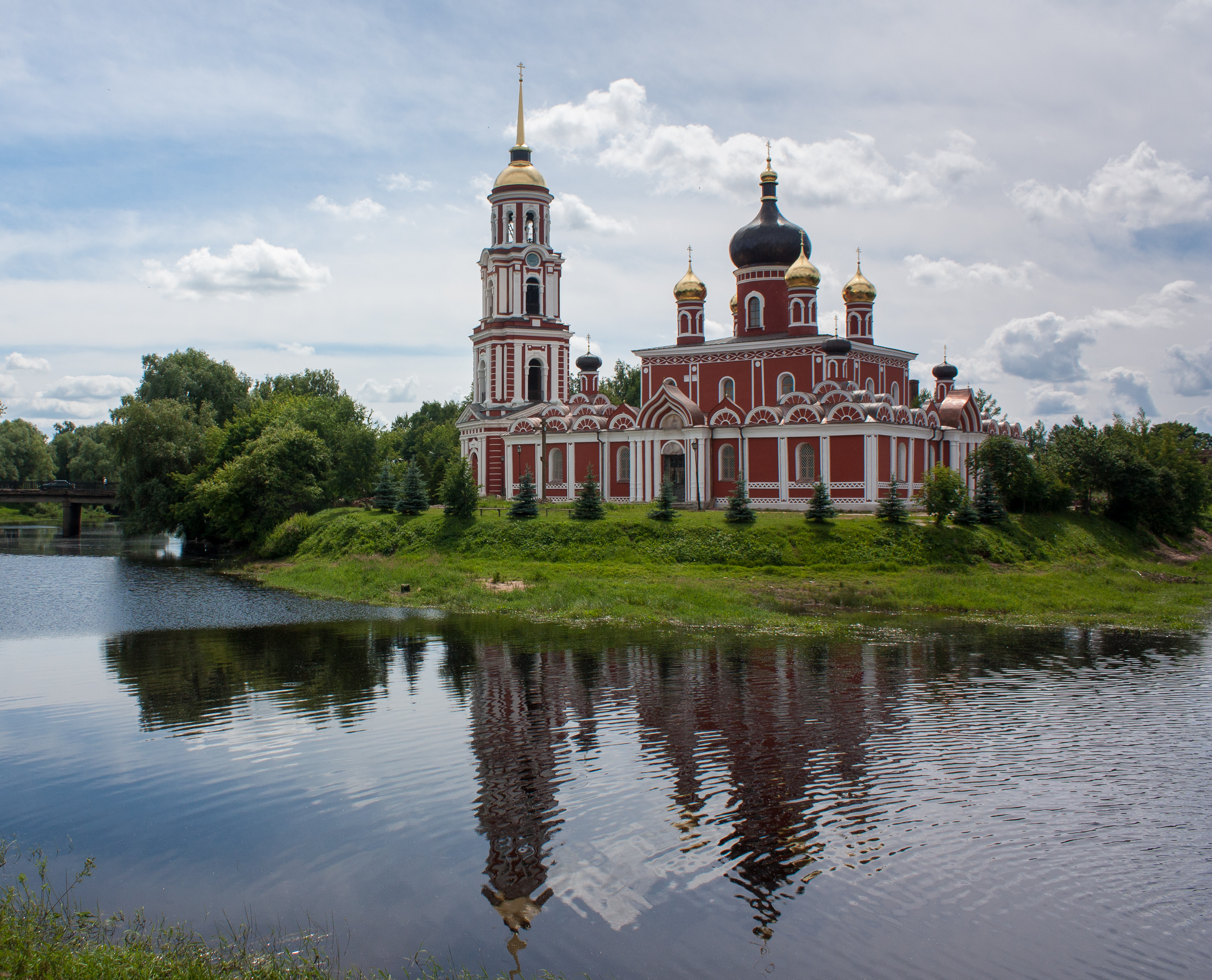 Ансамбль Воскресенского собора: улица Возрождения, 1, Старая Русса, Новгородская область